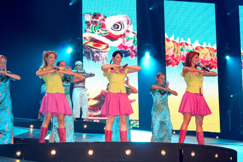 Bron: eigen foto, Theo Hendriks, Wechelderzande (België). K3 tijdens een concert in Ahoy, 22 oktober 2005. Source: own photo by Theo Hendriks, Wechelderzande (Belgium). K3 during a concert in Ahoy Rotterdam, 22 October 2005.